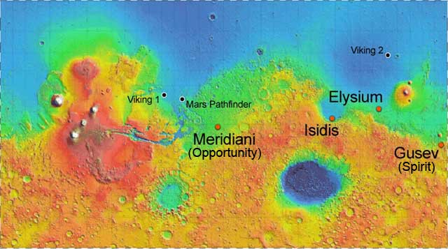 Mapka Marsa z punktami lądowań„ sond MER i Viking